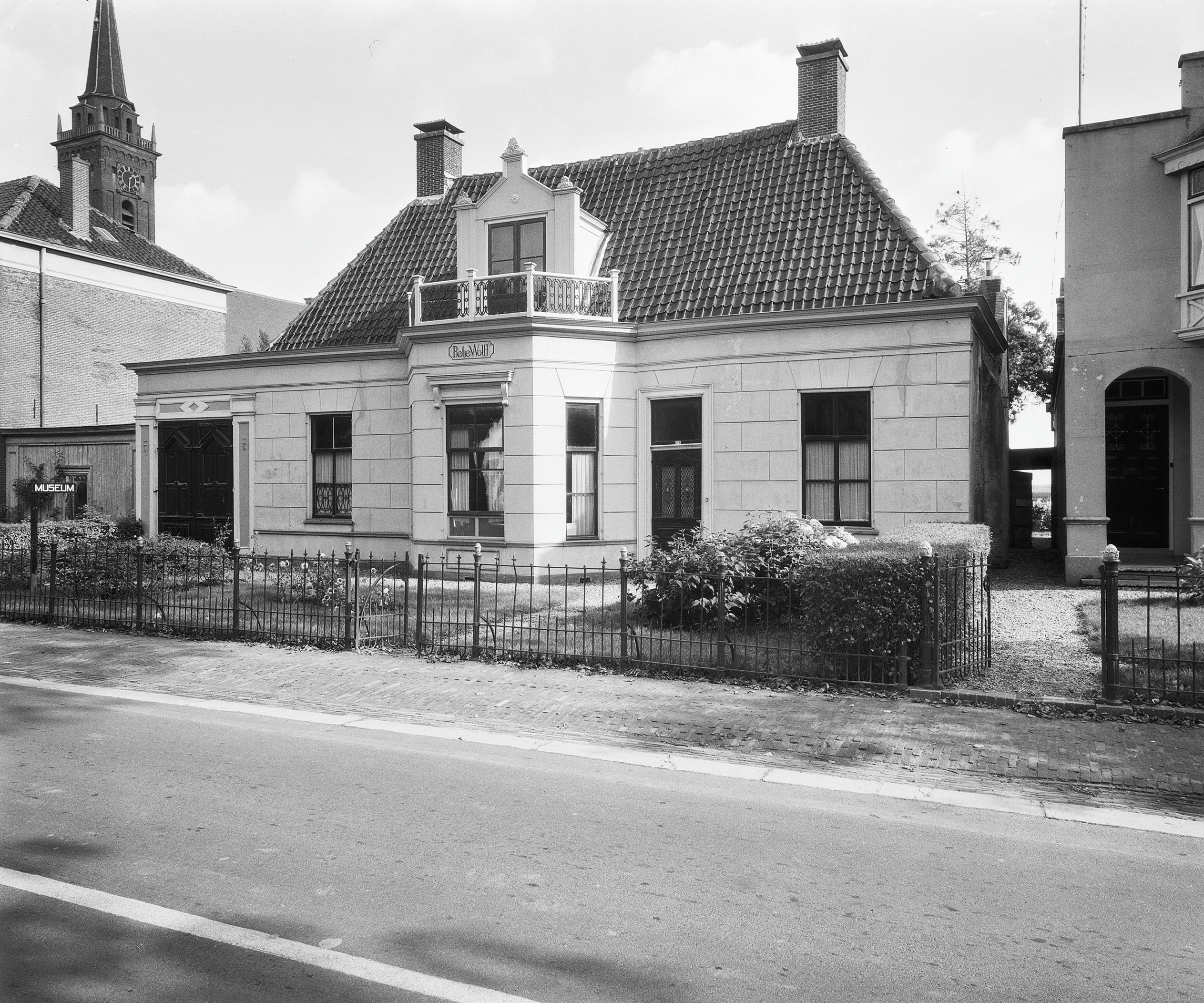 Museum Betje Wolff: exterieur voorgevel